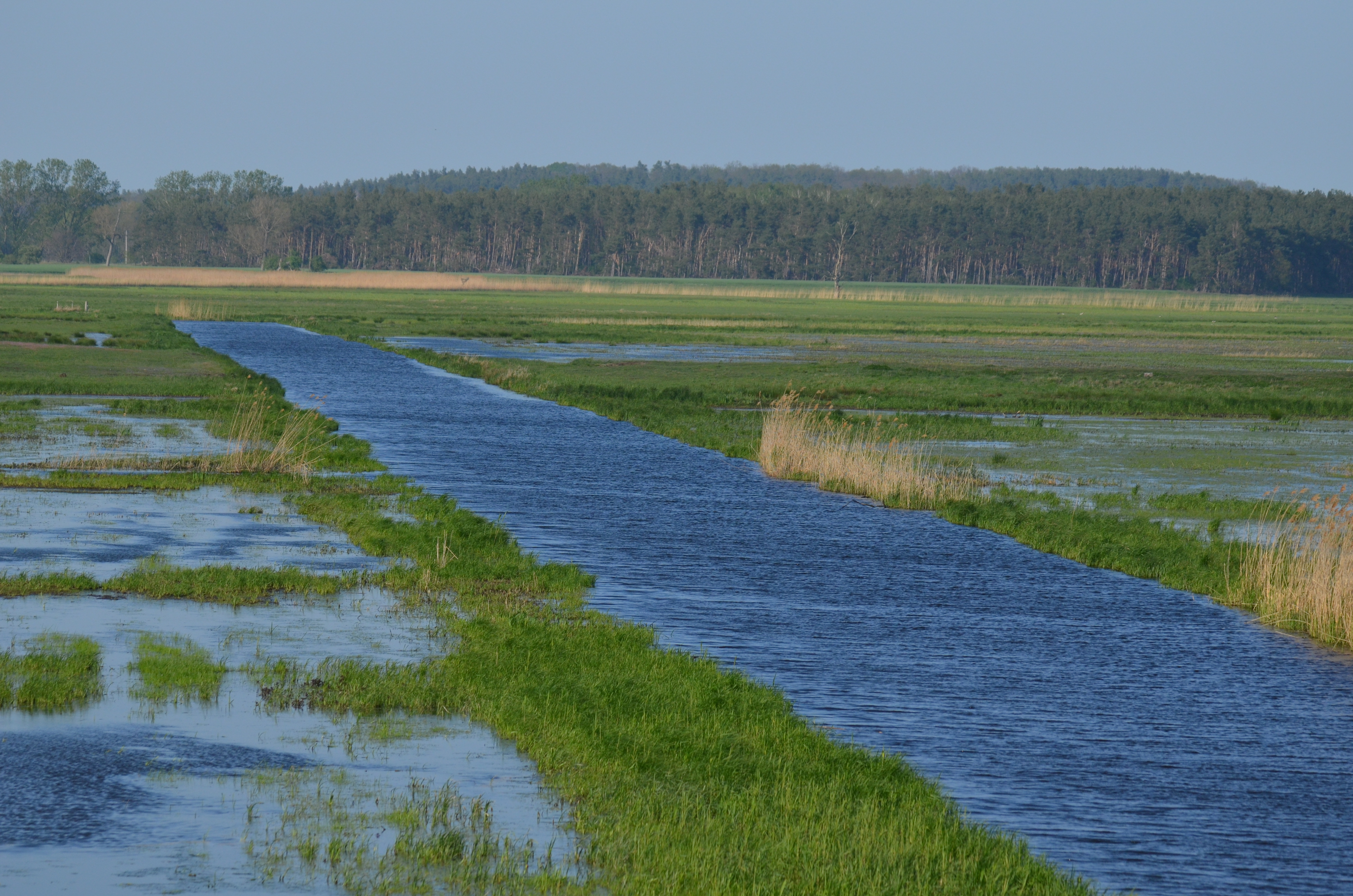 Aufgenommen im Vogelschutzgebiet "Niederung der Unteren Havel", NSG "Untere Havel Nord", Breiter Graben